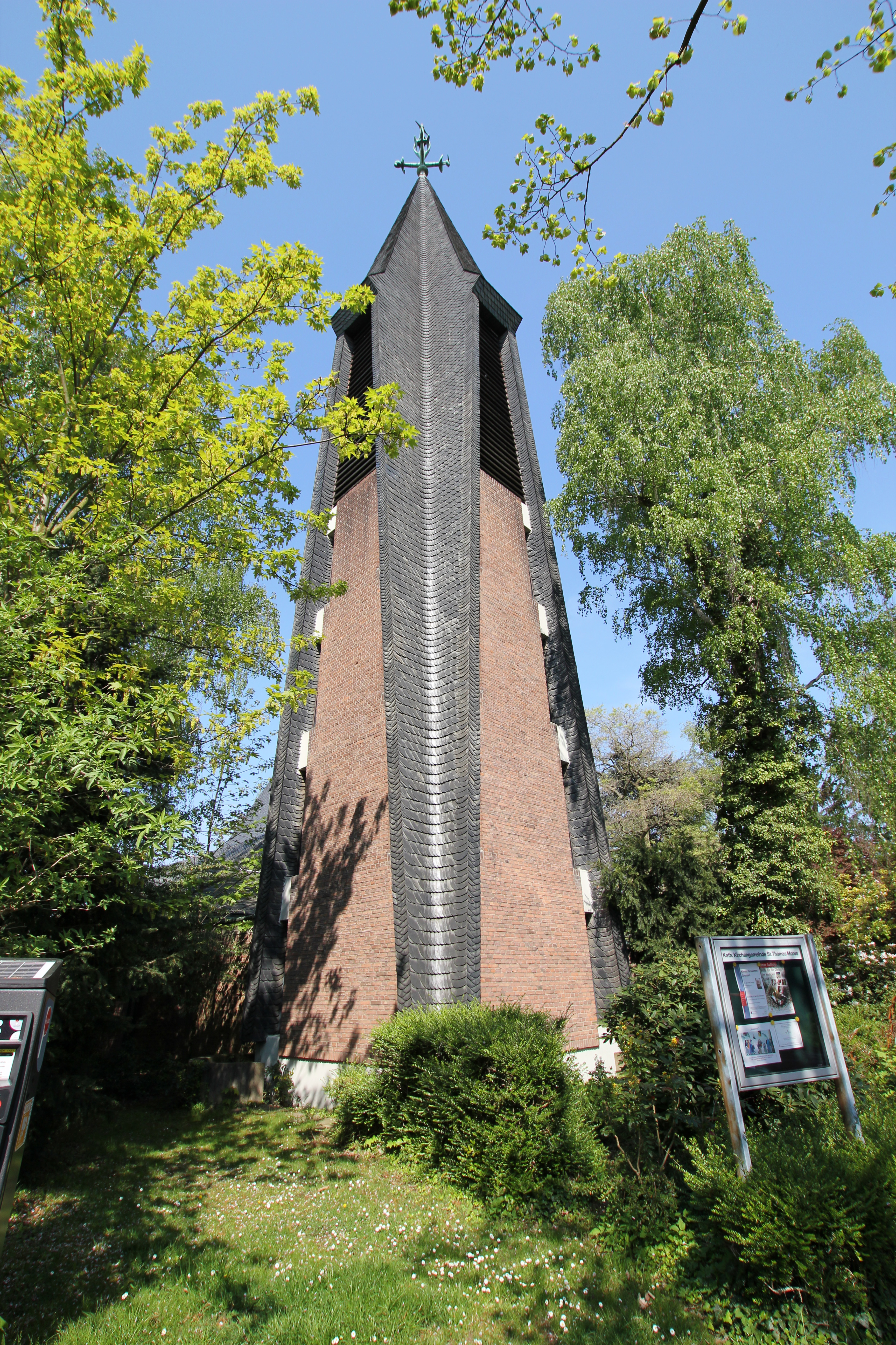 Köln-Lindenthal, Decksteiner Straße 5. Turm der St. Thomas Morus Kirche, Architekt Friz Schaller